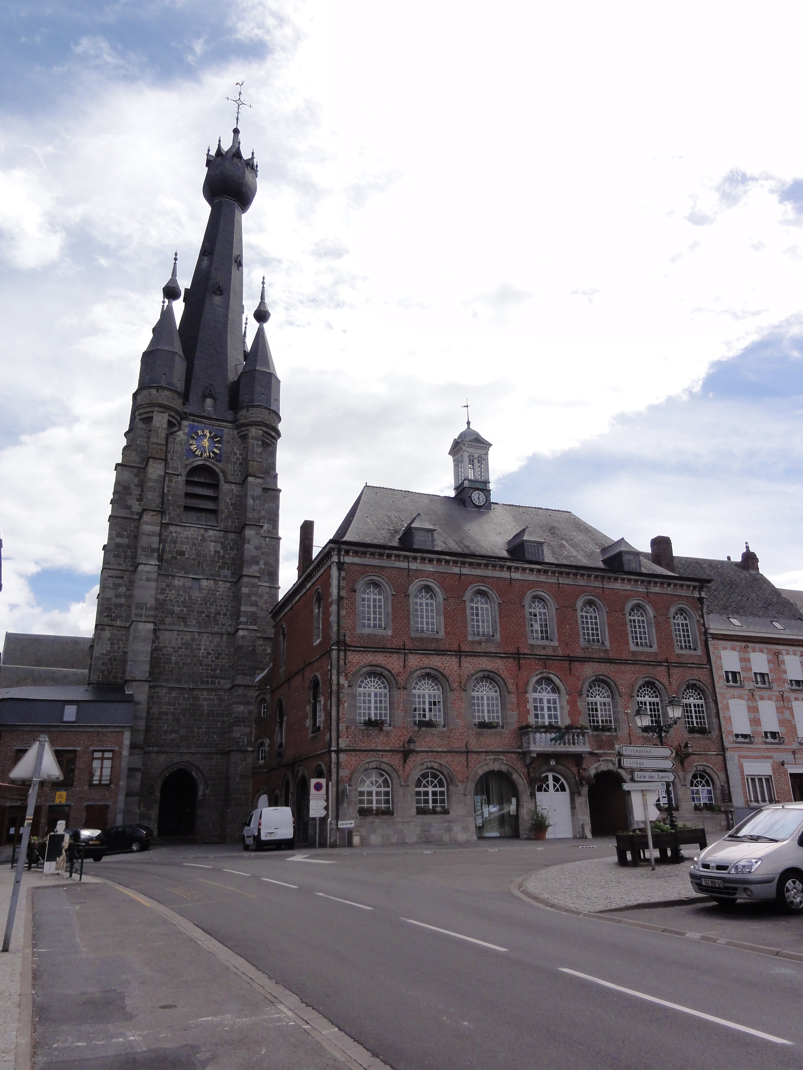 Solre-le-Château (Nord, Fr) église et mairie